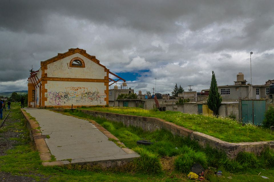 Estación de tren de Calpulalpan